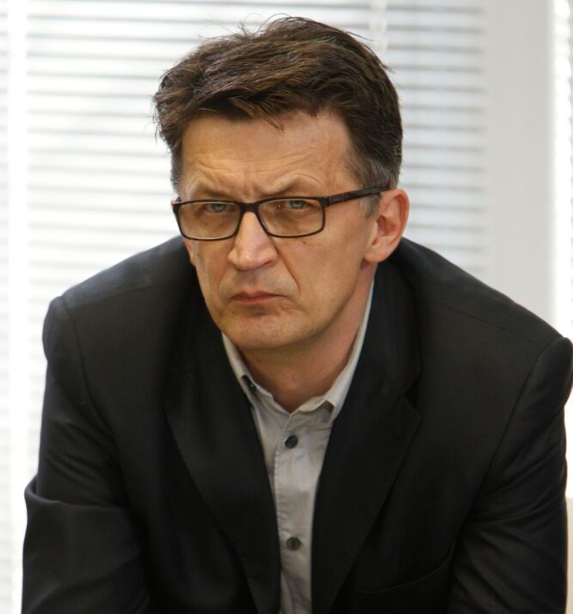 Блогер (Drugoi), фоторедактор сайта LiveJournal Рустем Адагамов